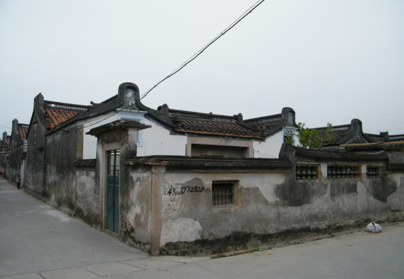 典型的下山虎样式（这个额外在正门前加围了前院），深浦